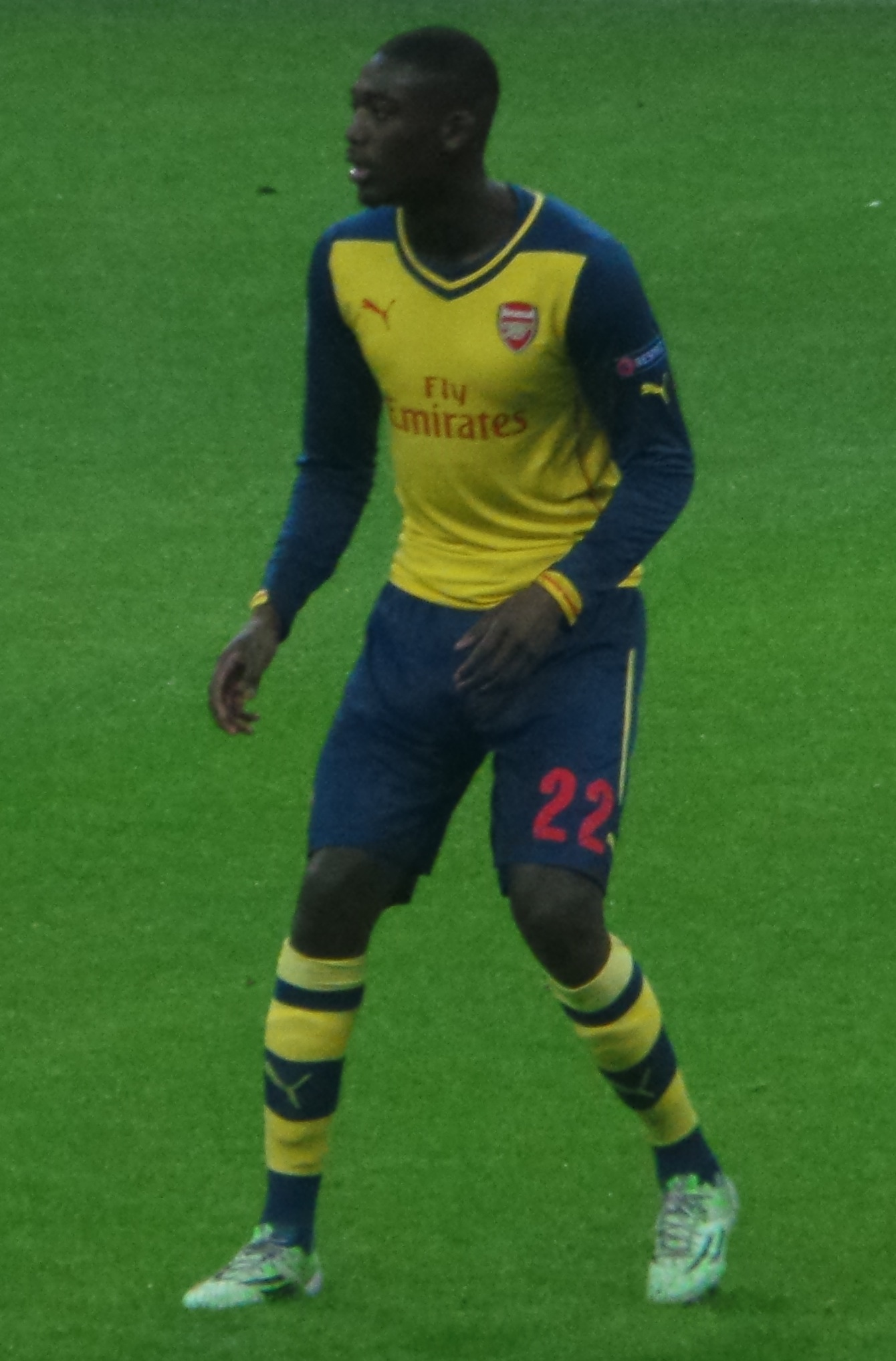 Yaya Sanogo sous le maillot d'Arsenal.